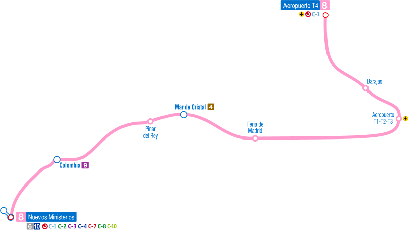 Recorrido de la línea 8 del Metro de Madrid